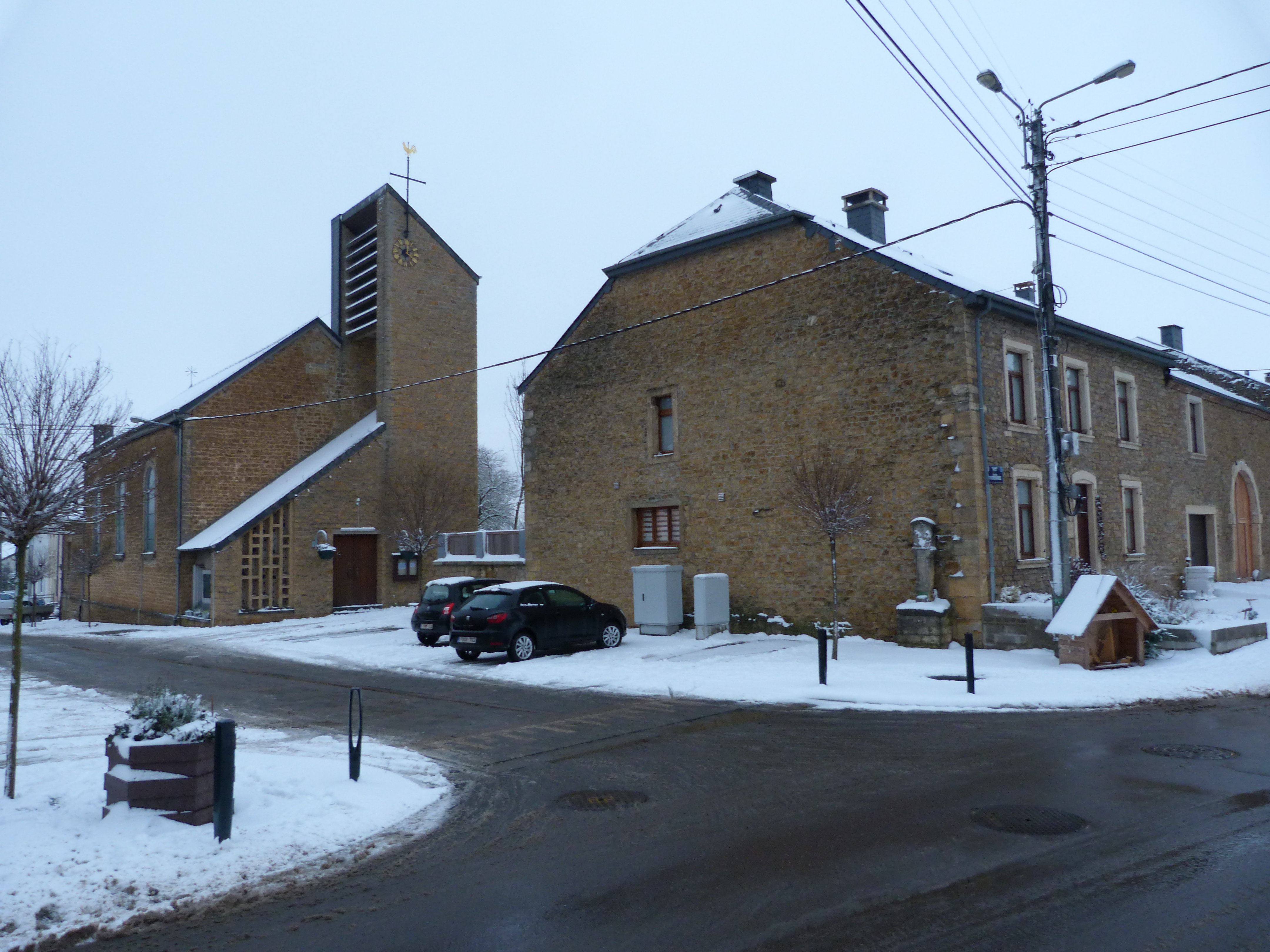 Eglise de Turpange, rue des Tisserands